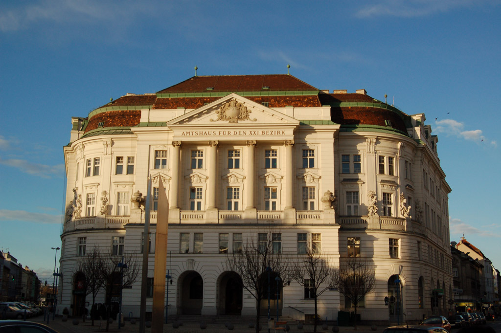 Amtshaus Floridsdorf